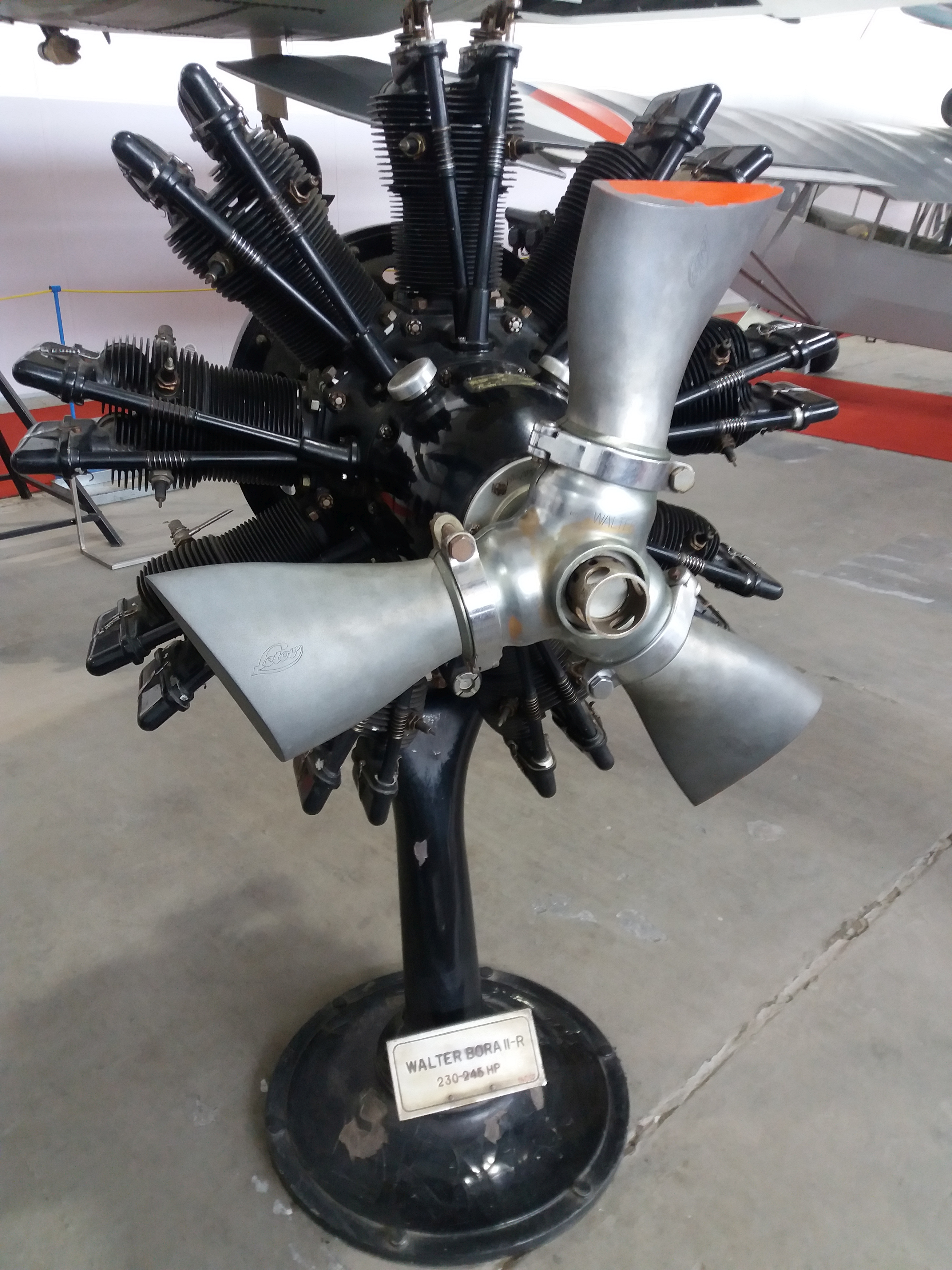 Walter Bora II-R (Kbely)